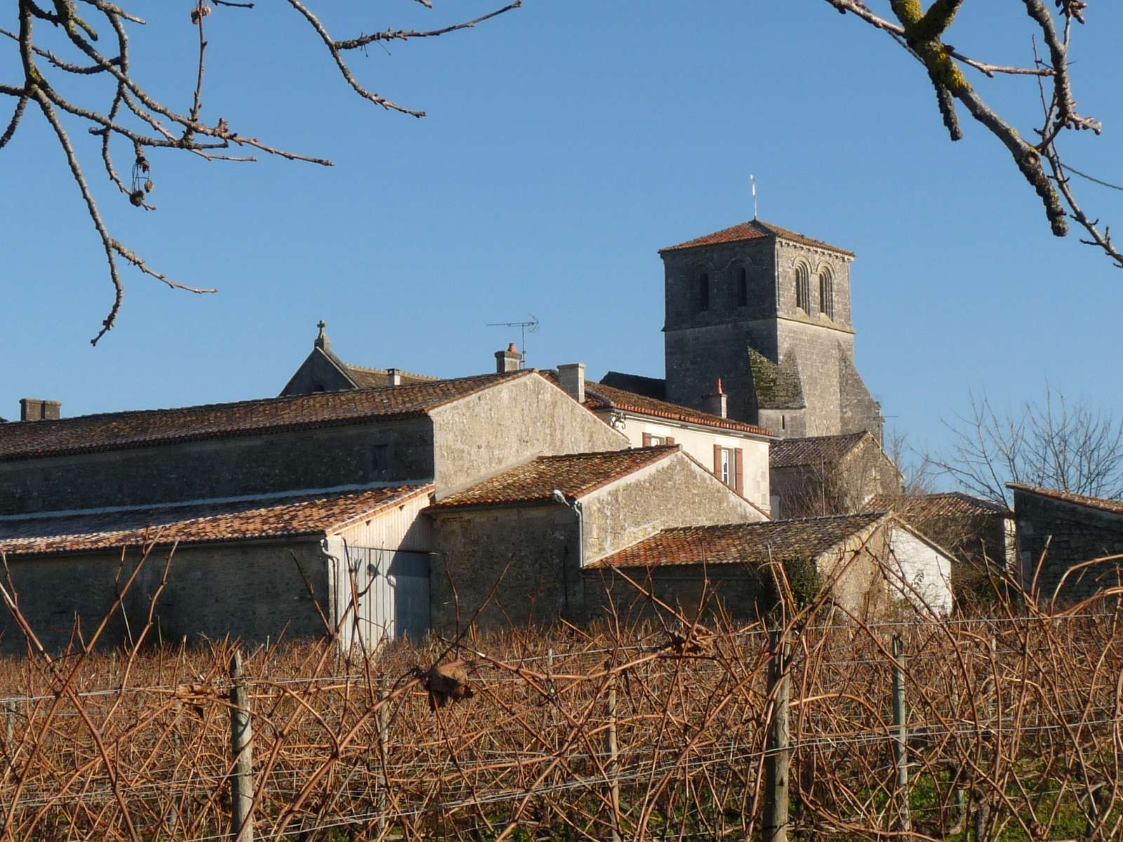 vue du bourg de Moulidars, Charente, France